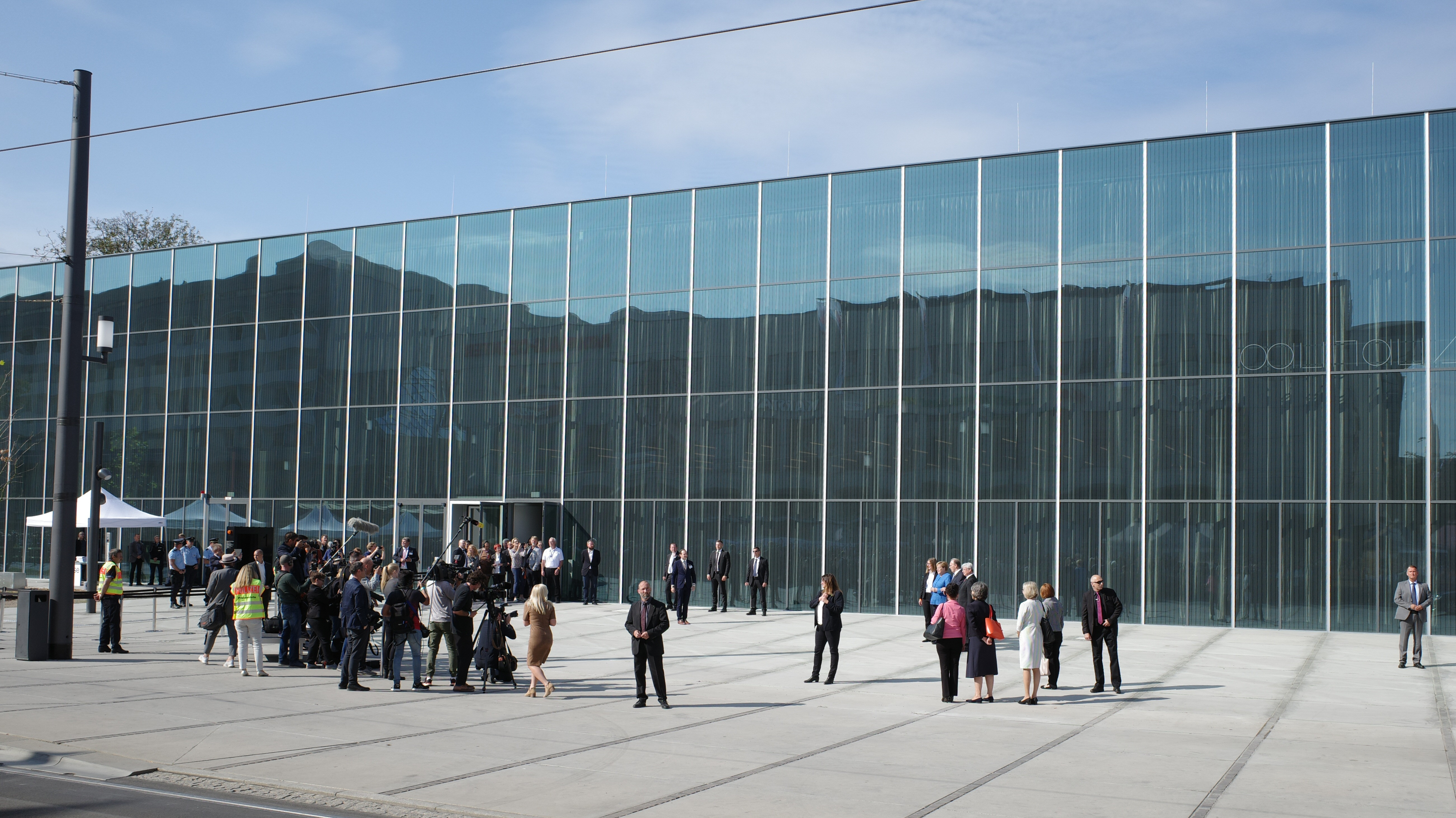 Dessau, Eröffnung des Bauhaus Museum am 08.09.2019 mit Dr. Claudia Perren (Direktorin und Vorstand der Stiftung Bauhaus Dessau), Kanzlerin Angela Merkel, Reiner Haseloff ( Ministerpräsident des Landes Sachsen-Anhalt) und Peter Kuras (Oberbürgermeister der Stadt Dessau-Roßlau).